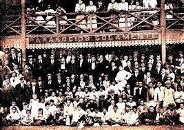 La tribuna oficial en la primera cancha de Rosario Central, en la Villa Sanguinetti (actual Cruce Alberdi).